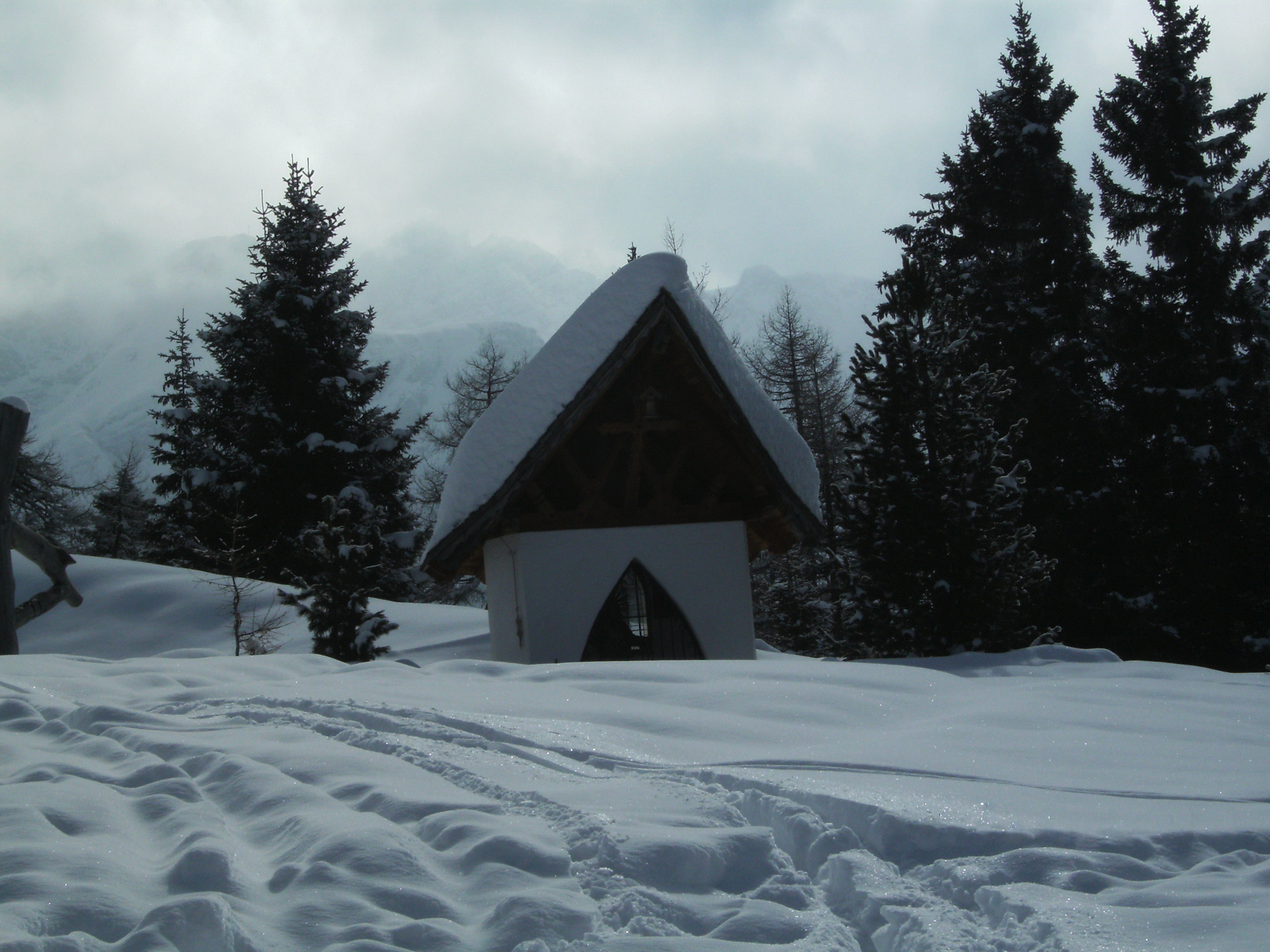 Kapelle auf der Birgitzer Alm 03-2010 This media shows the remarkable cultural object in the Austrian state of Tyrol listed by the Tyrolean Art Cadastre with the ID 29908. (More images on Commons)